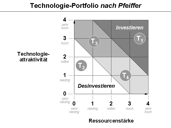 Technologie-Portfolio nach Pfeiffer - Handlungsempfehlungen, vgl. Das Technologie-Portfolio-Konzept zur Beherrschung der Schnittstelle Technik und Unternehmensstrategie, in: Hahn, D.; Taylor, B. (Hrsg.); Strategische Unternehmensplanung. Stand und Entwicklung. 4. Auflage, Heidelberg, Wien 1986, S. 149-177